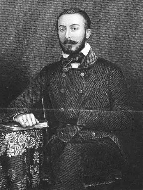 Retrato de Adolfo de Castro